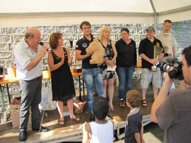 Romain Edouard remportant la seconde édition du tournoi de Ciammanacce